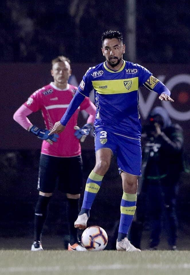 Pancho Tapia Futbolista Chileno